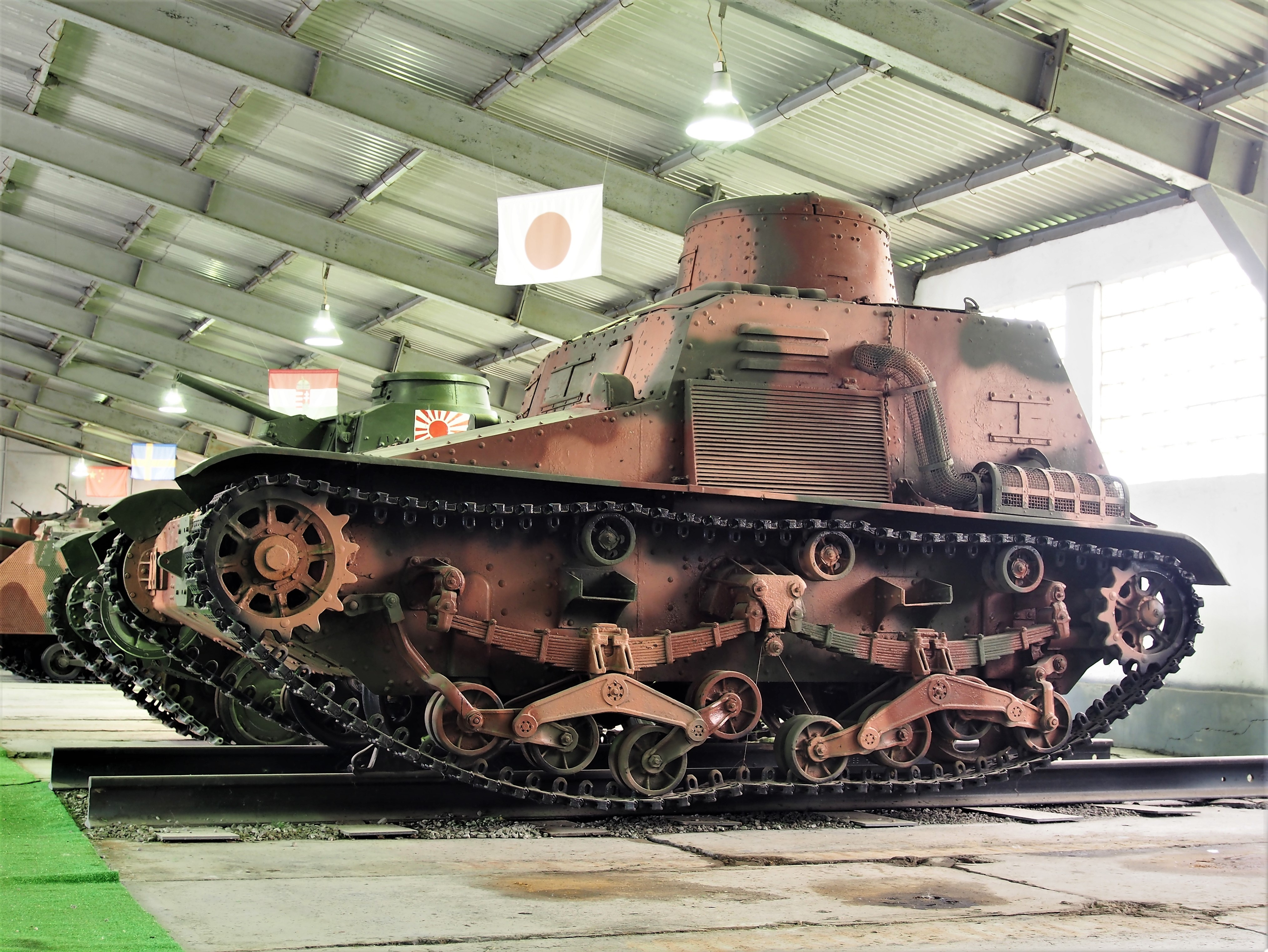 Хо-ГиБронетранспортер-дрезина Хо-ги (тип 2595).